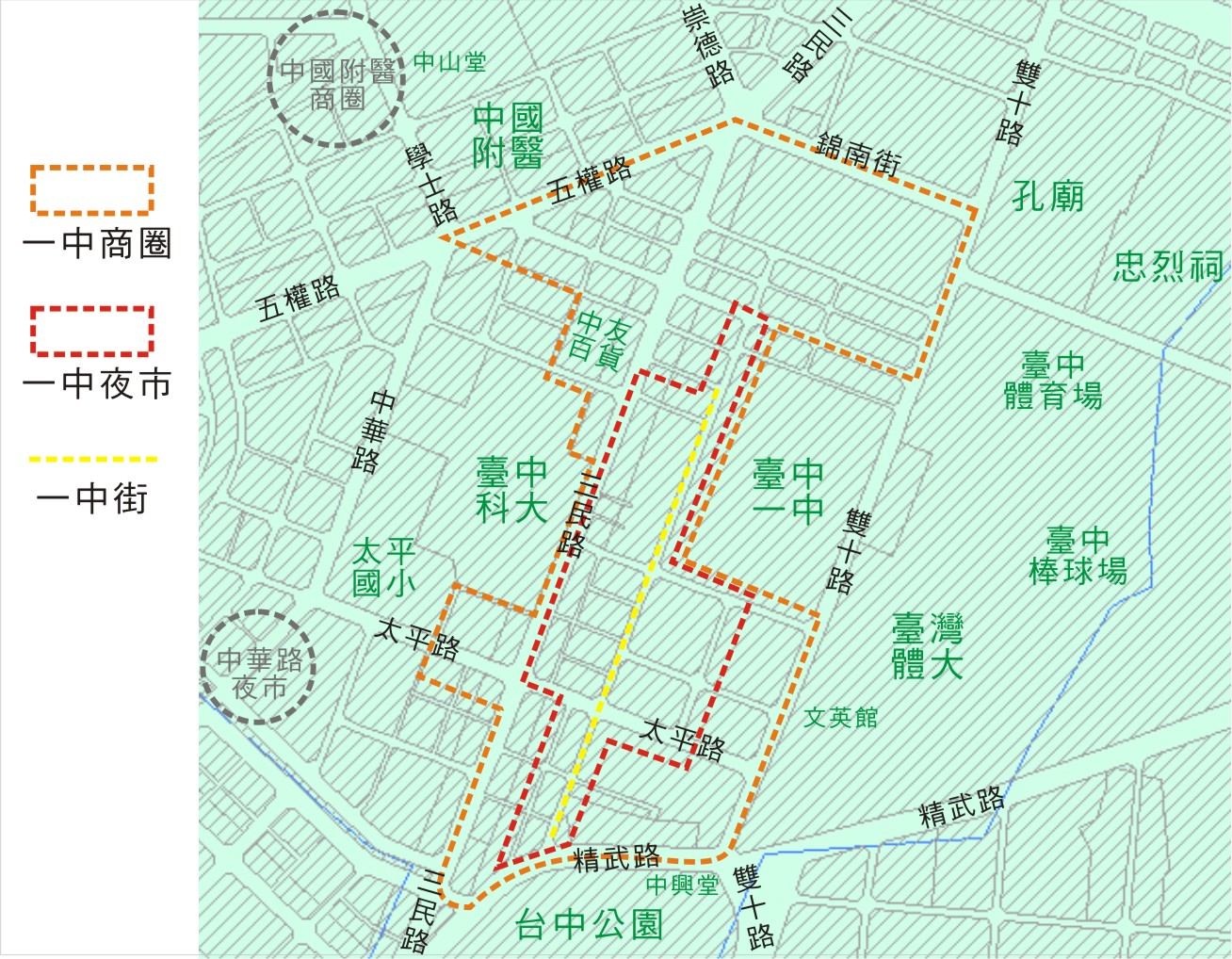 臺中市北區一中商圈示意圖。